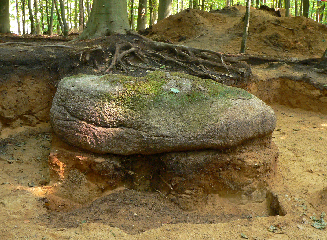 Großsteingrab Linsburg, Findling